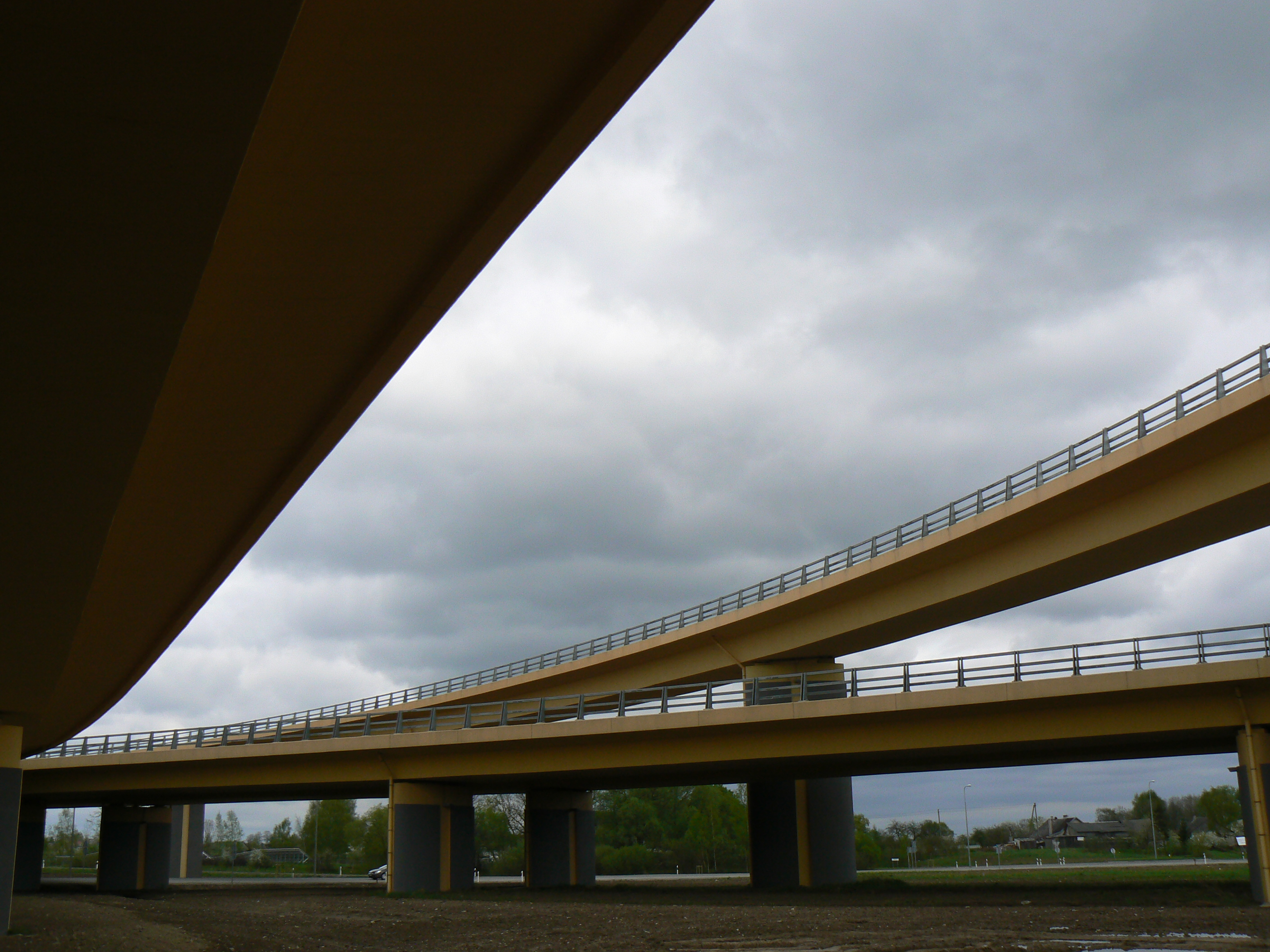 Viadukty na dálnici A1, směr Kaunas. Více viz obr. File:MÚKJakų19.JPG.